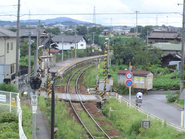 JR東海太多線 美濃川合駅 2004年9月6日投稿者(Kone)が撮影